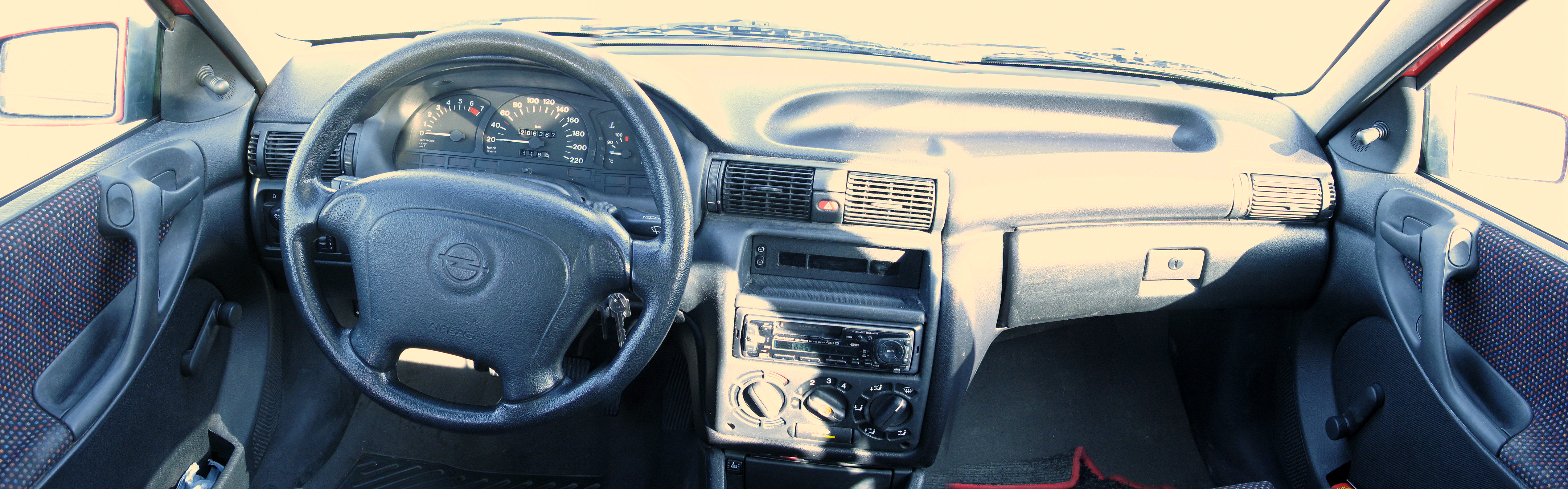 Opel Astra F (BJ1994)